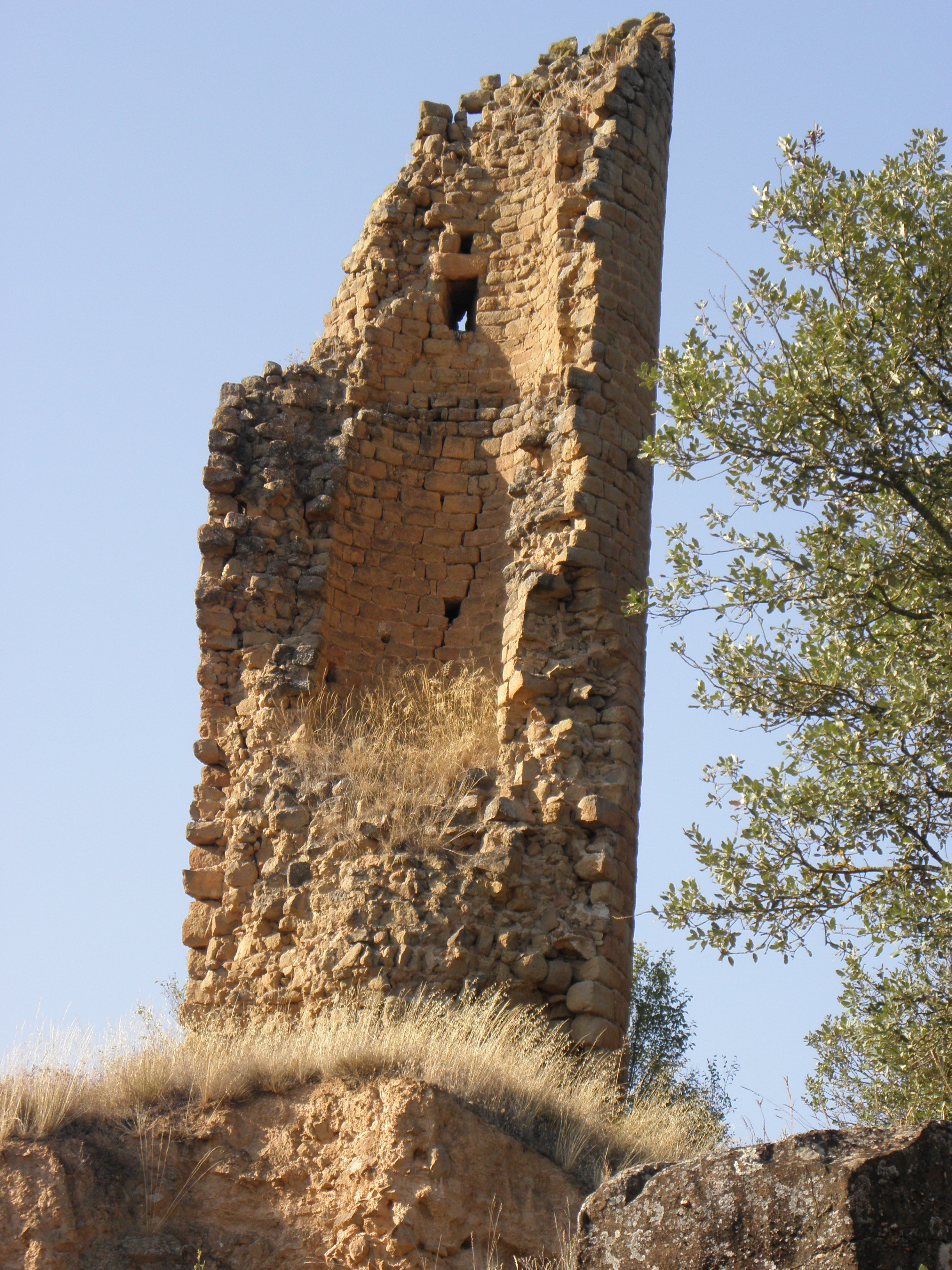 La torre de guaita de Sallent, al municipi de Pinell de Solsonès vista des del sud-est.